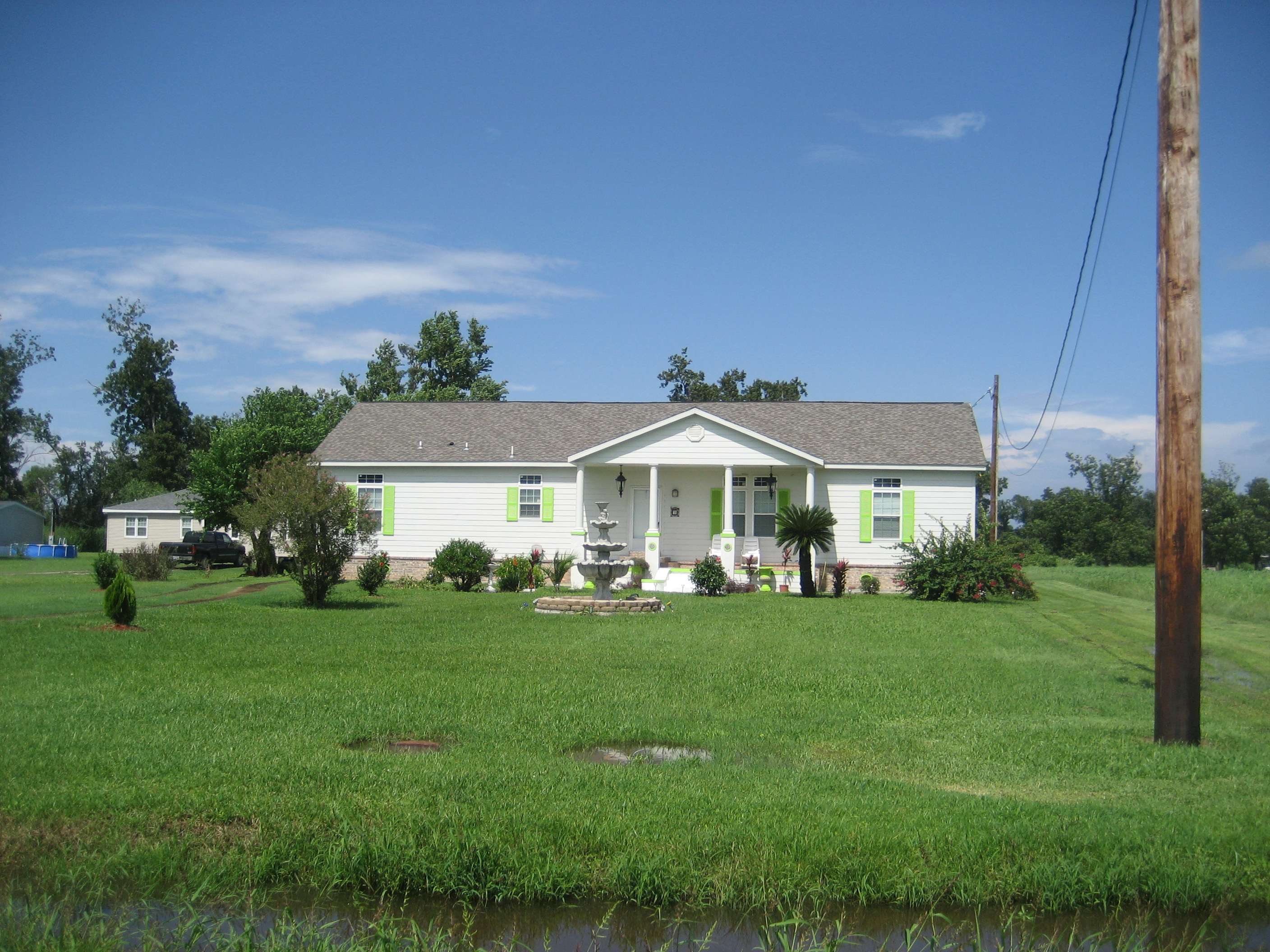 House, Davant, Plaquemines Parish, Louisiana.